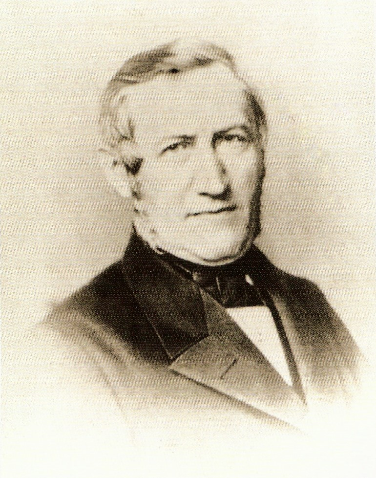 Christoph Friedrich Stälin, Fotografie